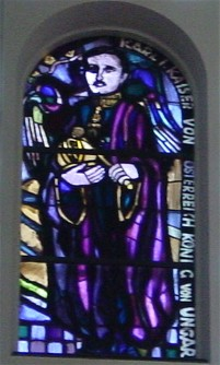 Description – eines der 32 Kirchenfenster in der Pfarrkirche Liesing (Wien23) gestaltet von Martin Häusle. Zeigt Kaiser Karl I. von Österreich Source – selbst fotografiert Date – Erstellungssatum: Sommer 2005